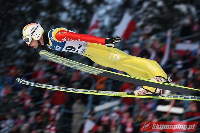 Puchar Świata w Zakopanem 2012/2013 – konkurs indywidualny (12 stycznia 2013)